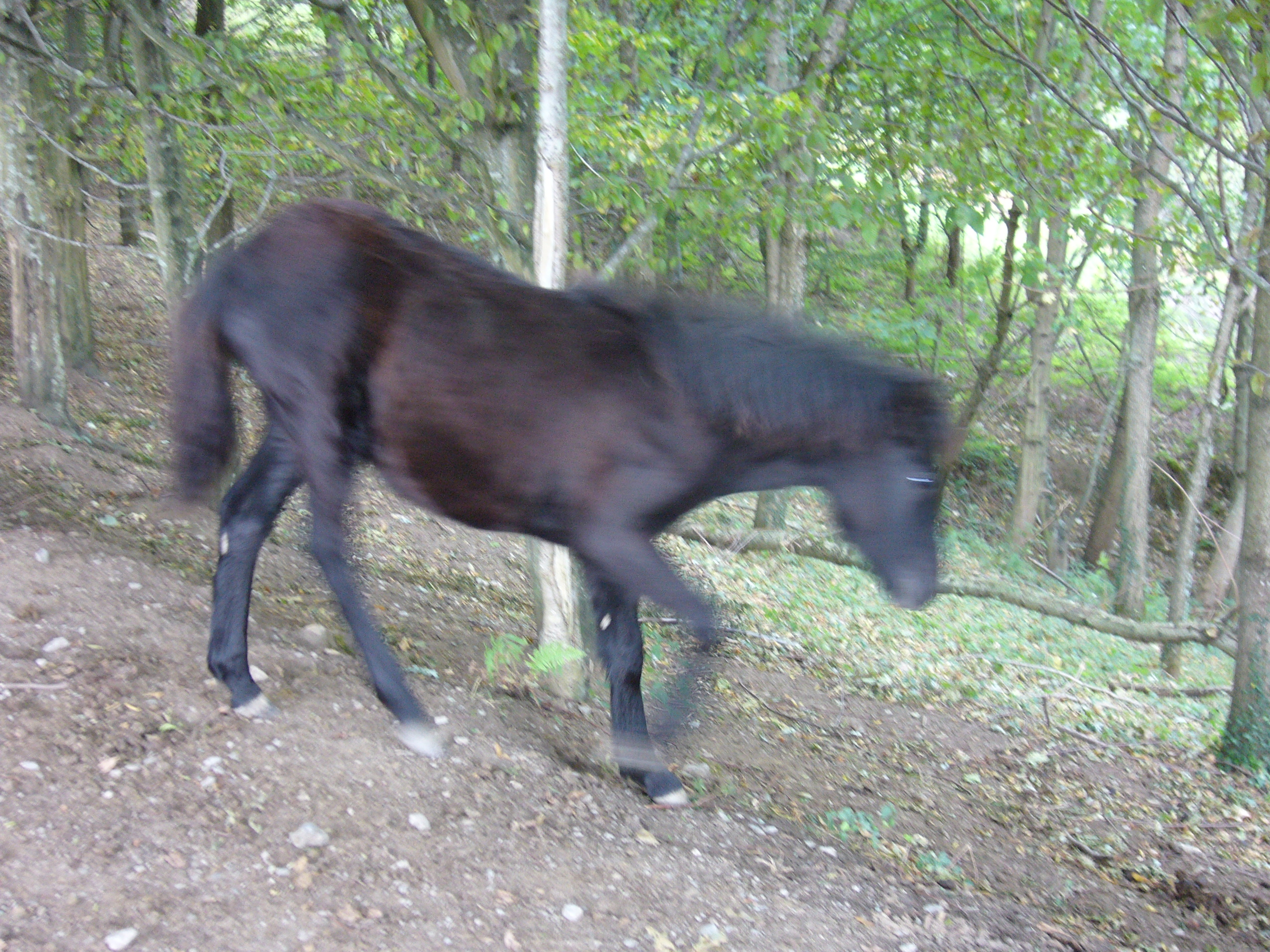 Pottoka moxala mugimenduan